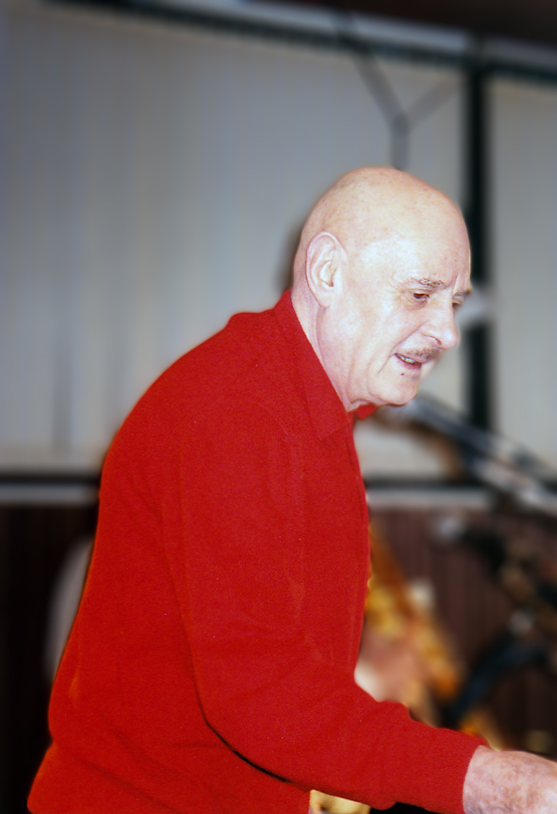 Le Professeur Choron en concert le 7 et le 8 décembre 1996, à la Maison de la culture Louis Aragon d'Hagondange, avec le groupe Tes Baisers ont le Goût de la mort.